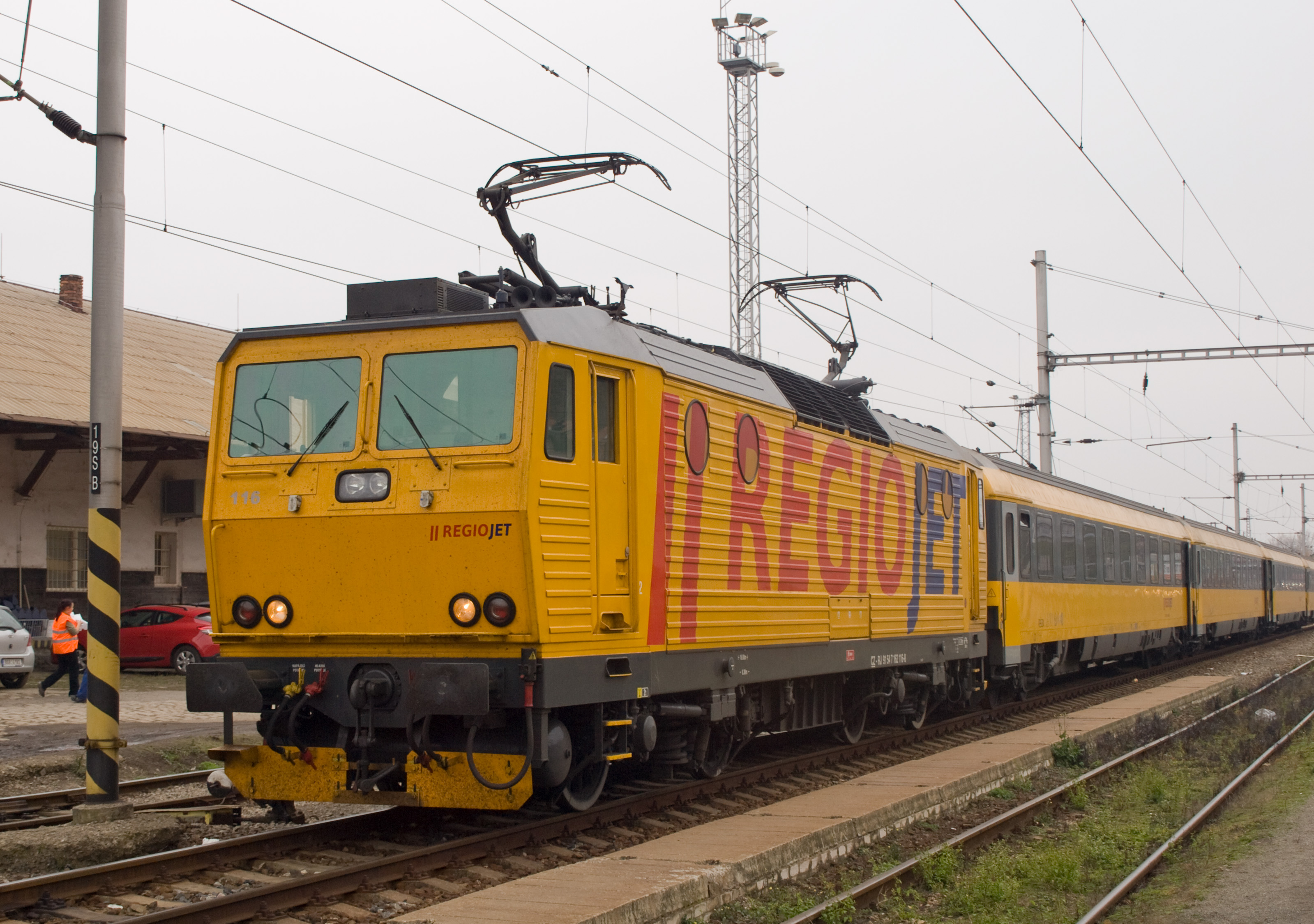 Tato série fotografií vznikla za laskavého svolení společnosti Student Agency – RegioJet